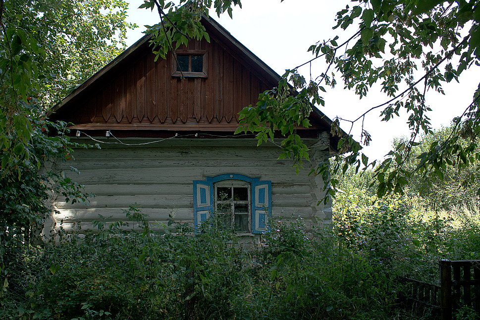 Звичайний для архітектури с. Довгиничів дерев"яний будинок